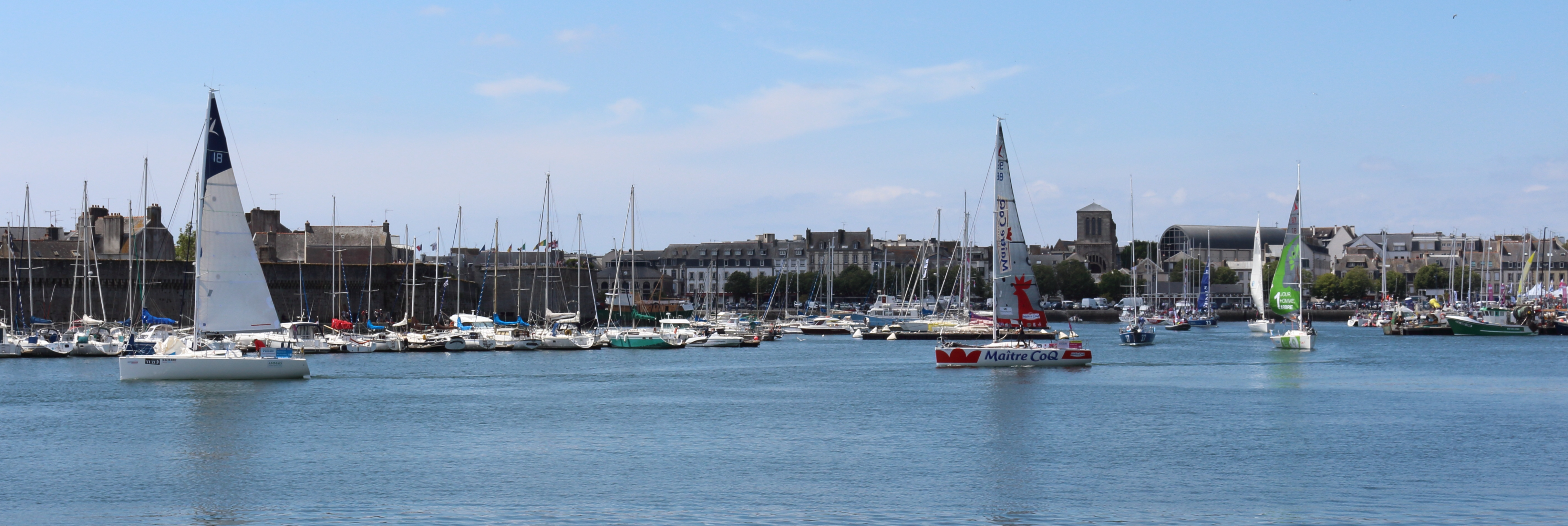 Solitaire du Figaro 2015 : les concurrents sortent du port de Concarneau pour rejoindre le départ de la troisième étape. Concarneau, Finistère, Bretagne, France.